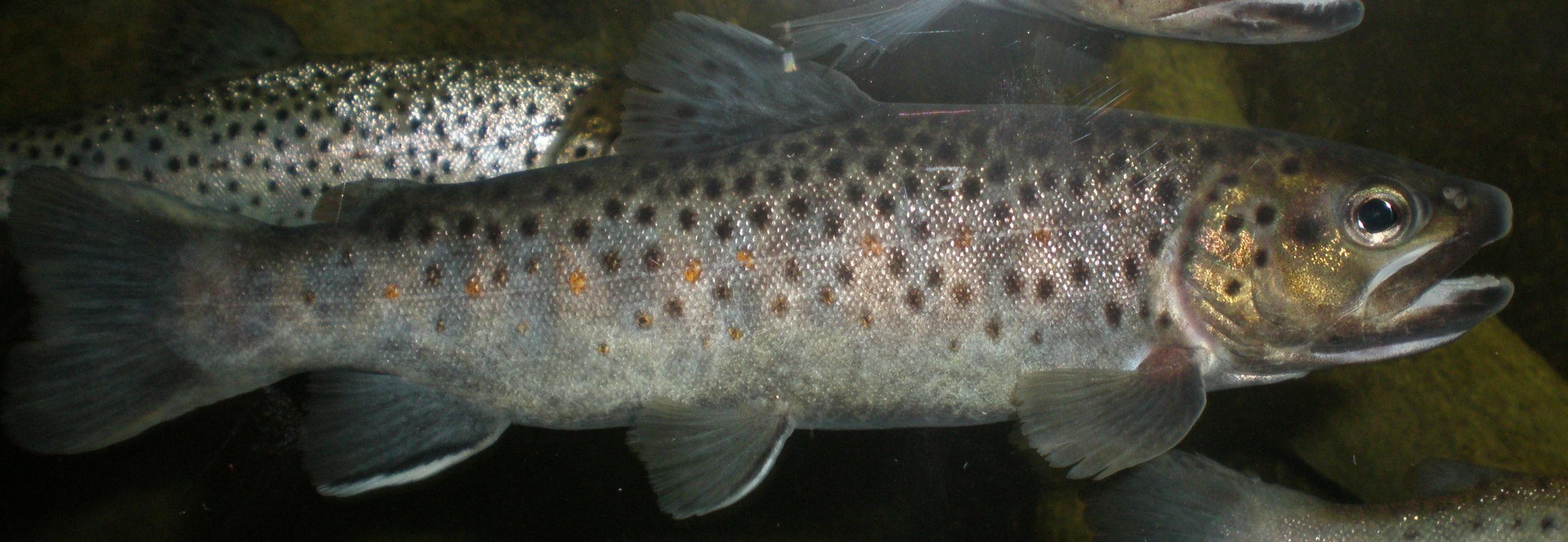 Trucha común (Salmo trutta) en Centro de Acuicultura Las Vegas del Guadiana de Badajoz (Extremadura, España)